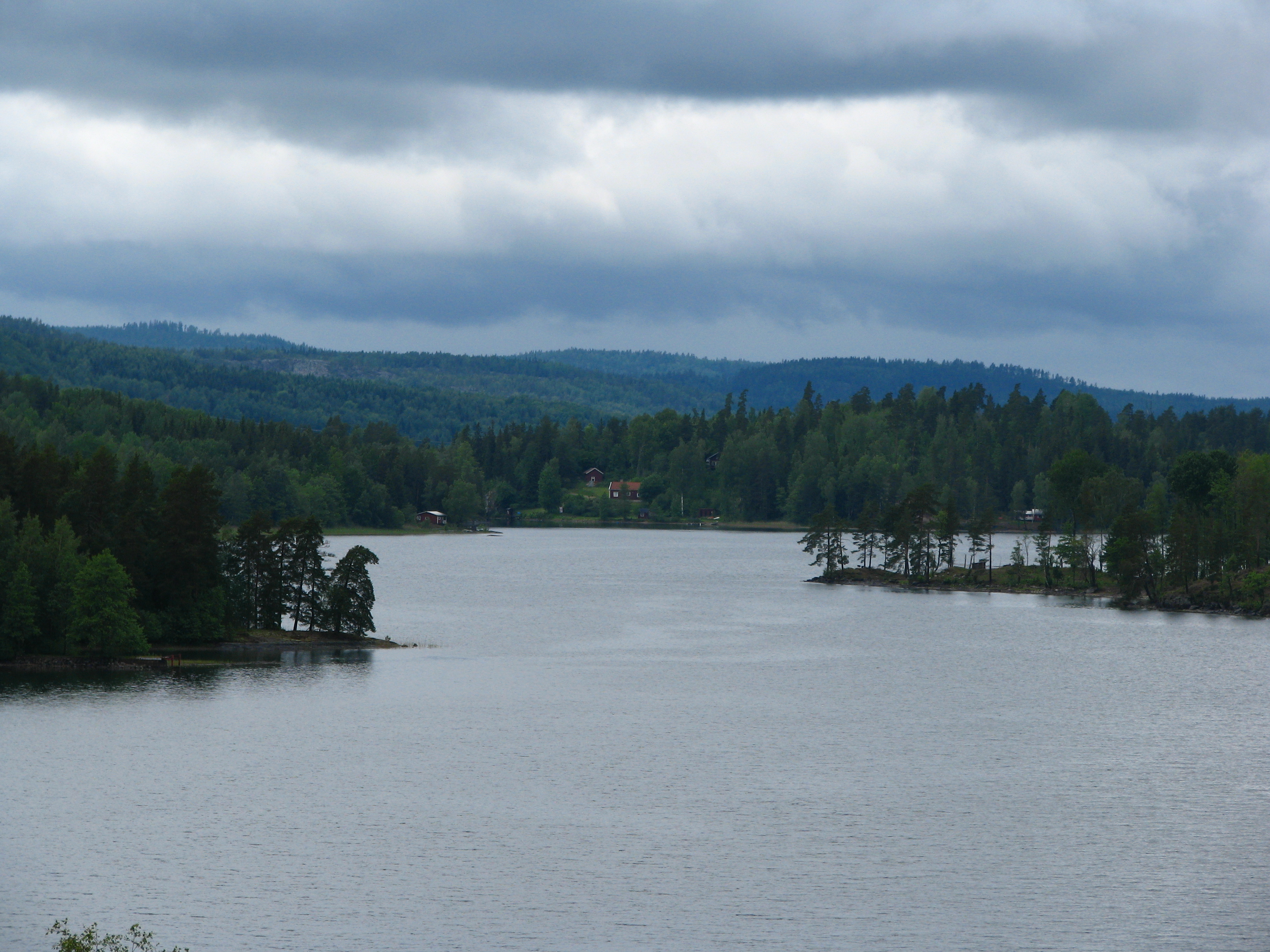 Ånimmen fotograferad från Björkebäck.